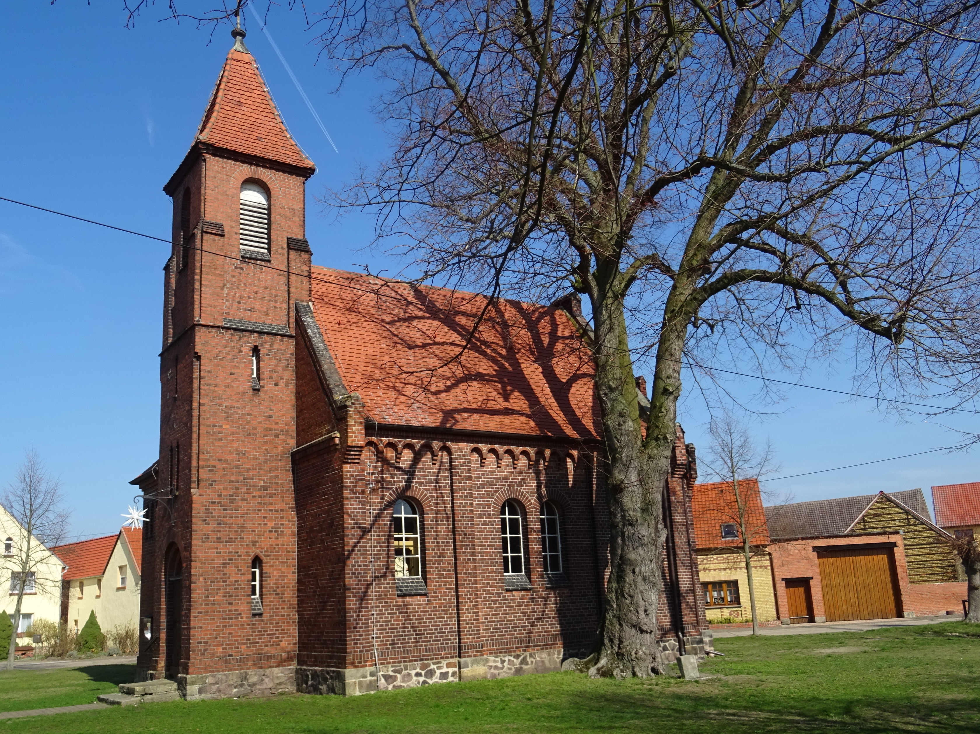 Zemnick, Ortsteil von Zahna-Elster, Dorfkirche von Südwesten